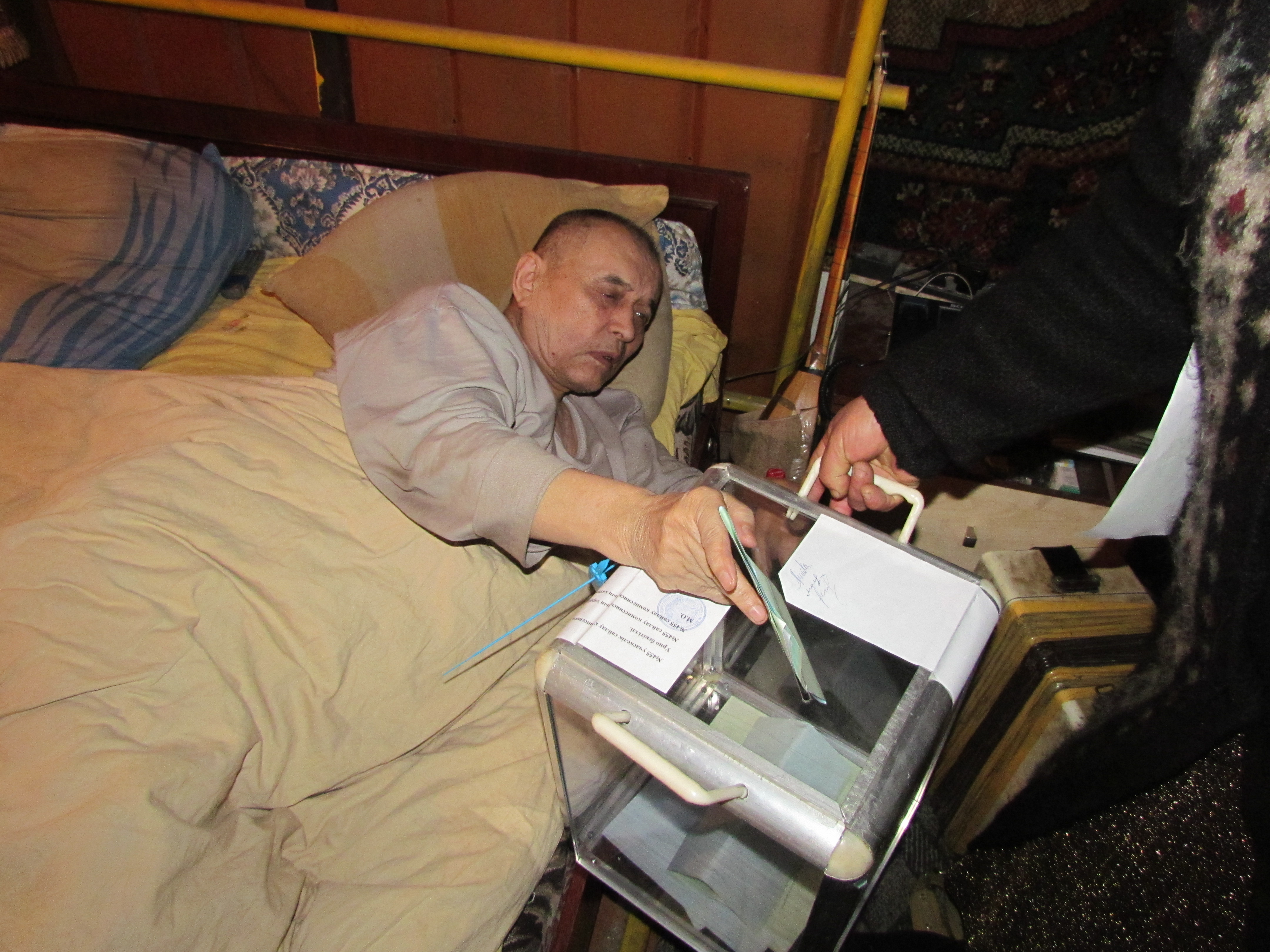 Голосование с помощью переносной урны на внеочередных выборах депутатов мажилиса парламента Республики Казахстан на избирательном участке № 455 в Алматы. 15 января 2012 года.